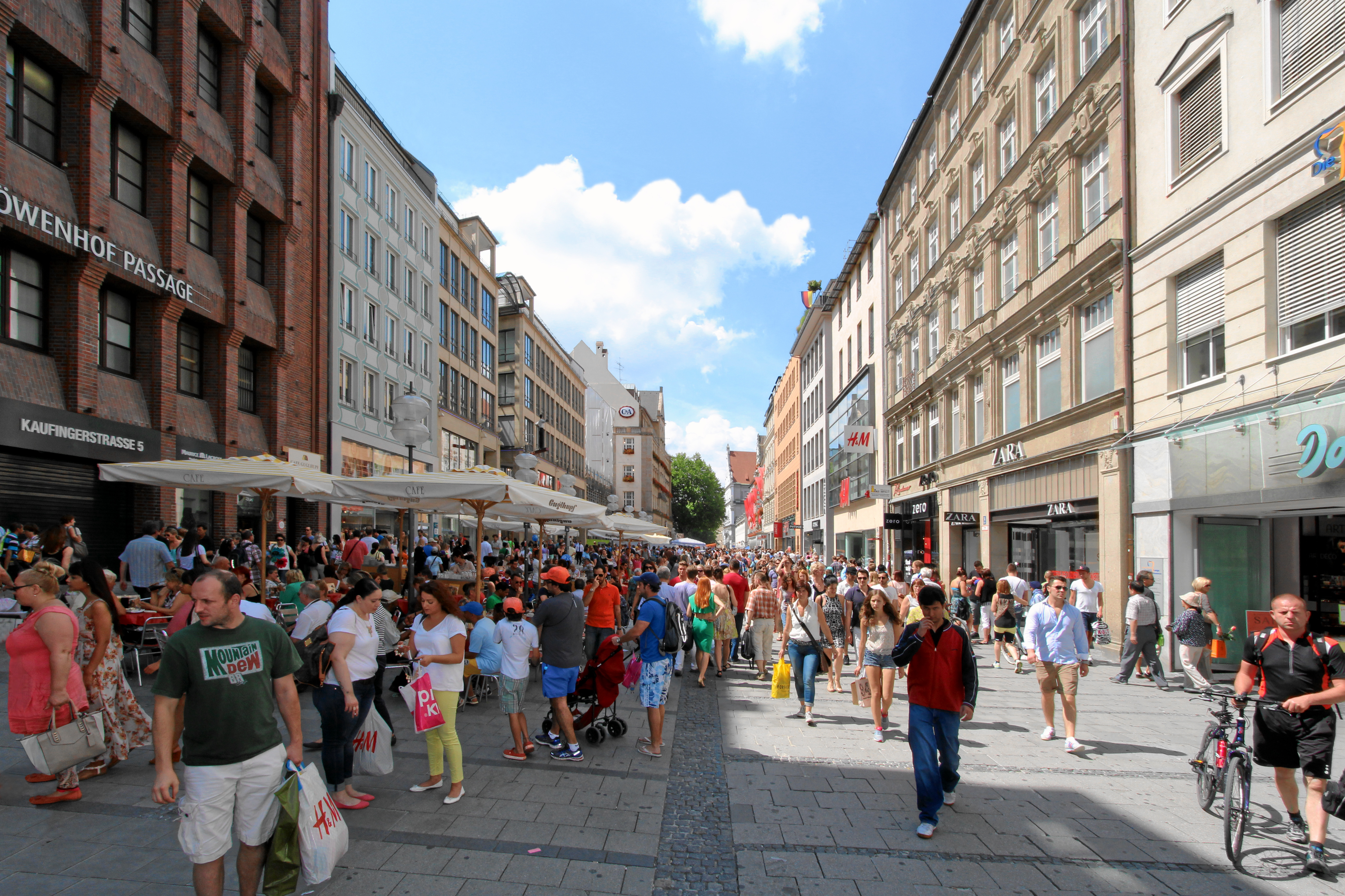 Die Kaufingerstraße 2014